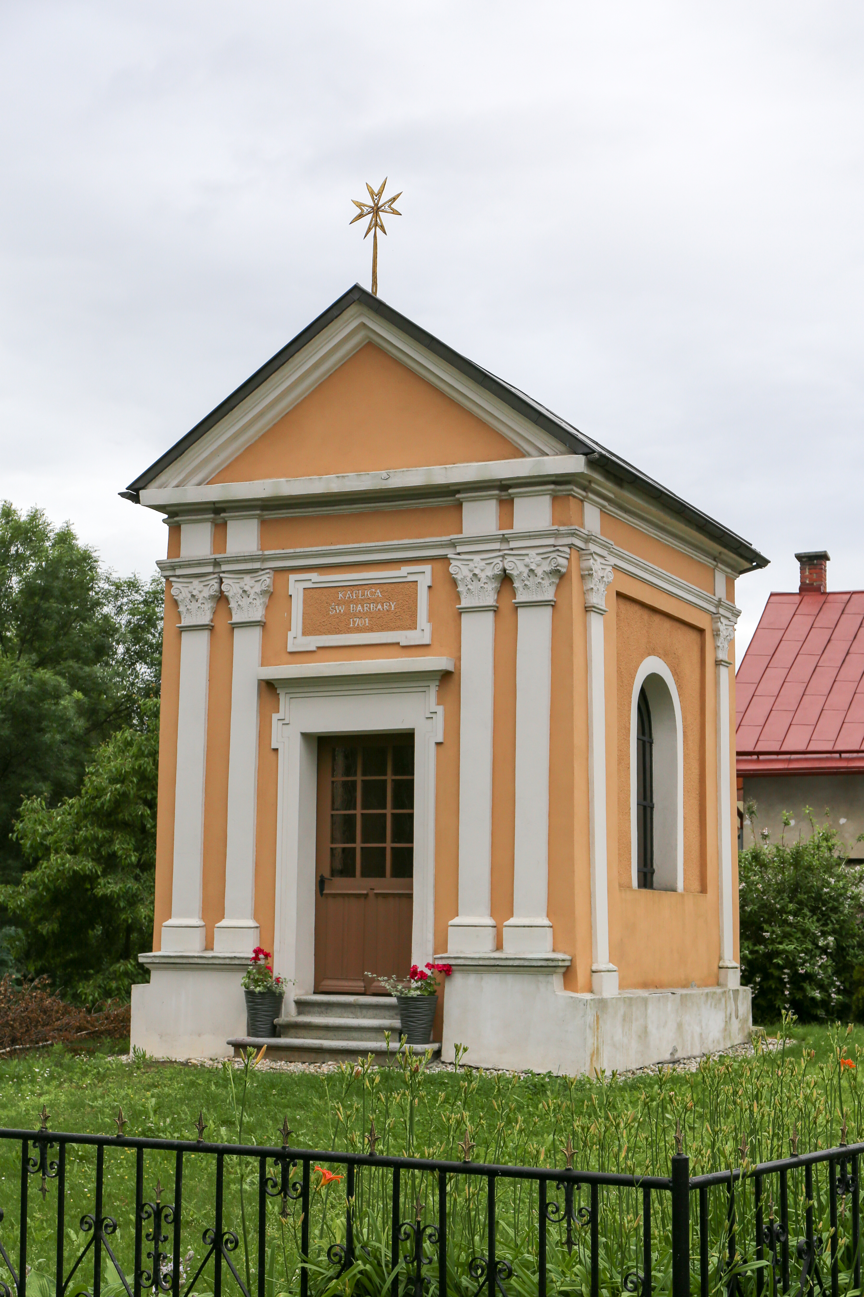 Grobniki - wieś w Polsce położona w województwie opolskim, w powiecie głubczyckim, w gminie Głubczyce.